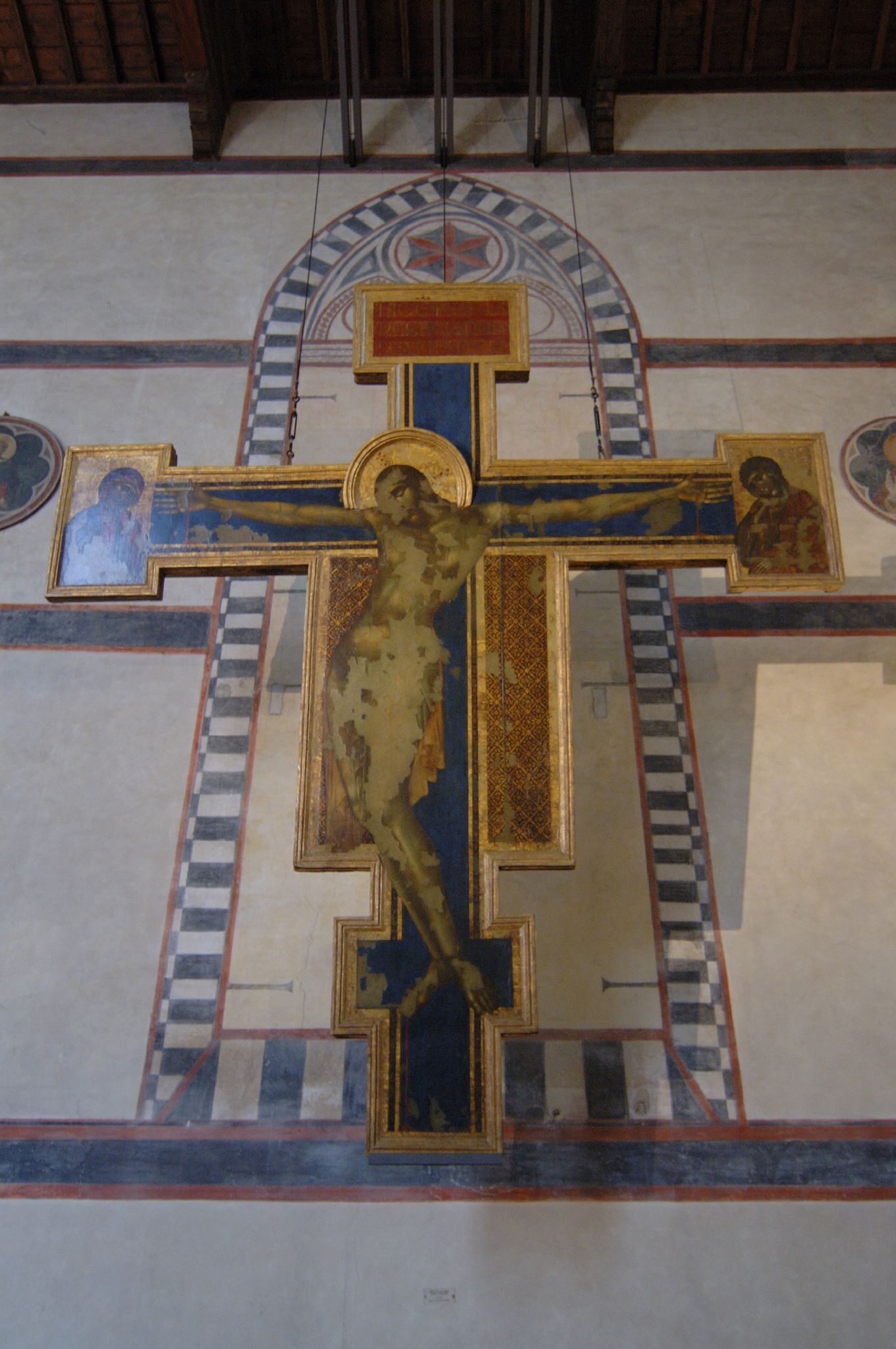 Firenze, Toscana, Italia